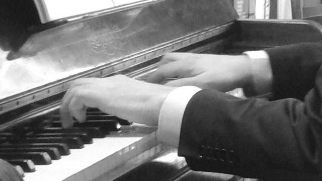 Il maestro Maurizio Balzola